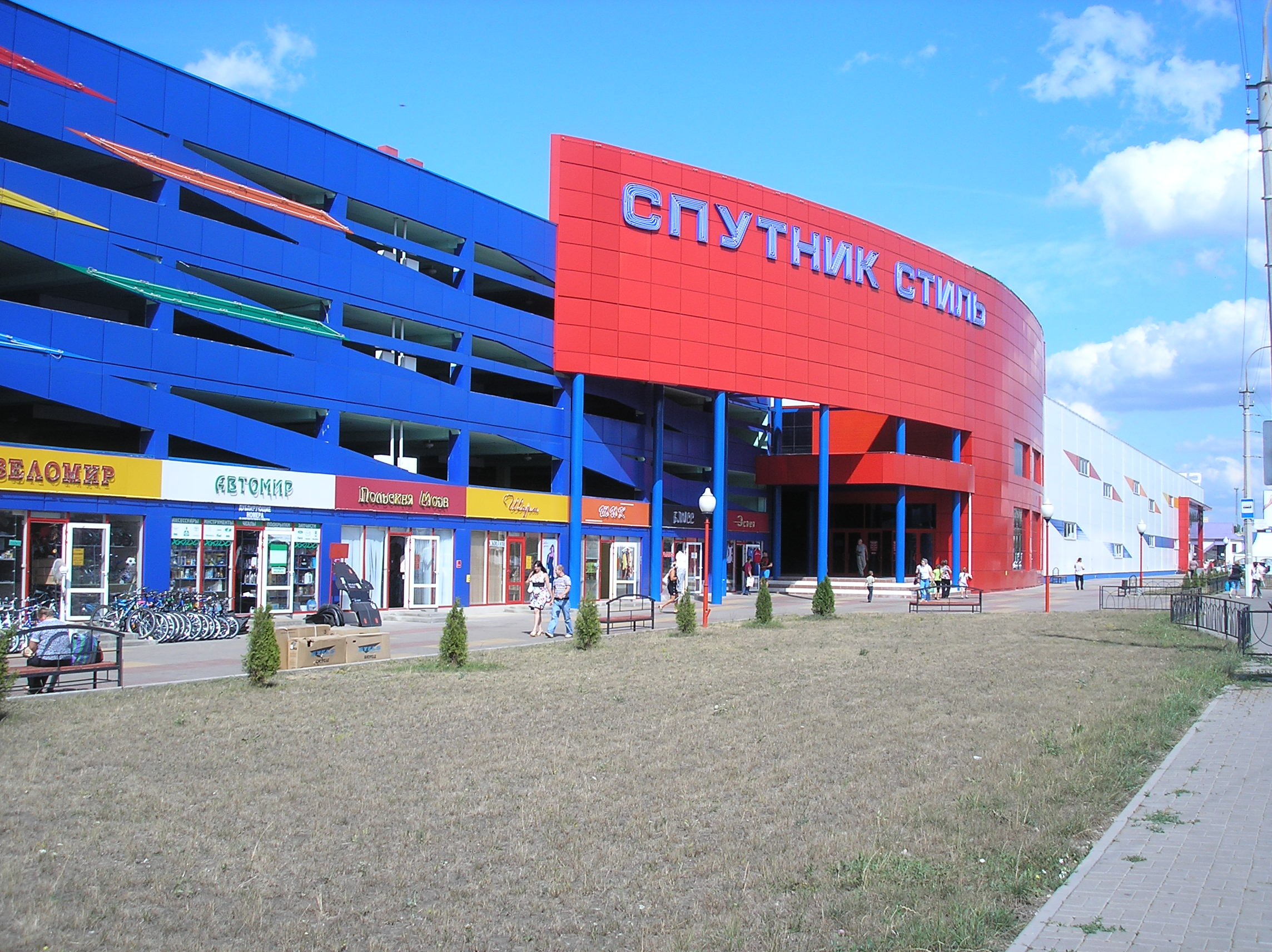 Магазин одежды Спутник Стиль